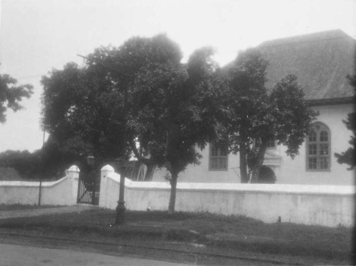 Foto. De kerk werd voornamelijk gebruikt door Portugees sprekende voormalige slaven (Mardjikers), afkomstig uit India (Coromandelkust), Ceylon en Malaca. Om vrij te worden hadden zij hun katholieke geloof moeten opgeven voor de protestantse overtuiging. . De Portugese Buitenkerk in Batavia